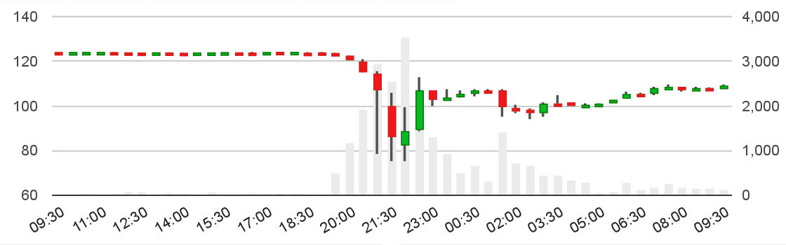 Реакция курса Bitcoin на бирже BTC-e на новость об аресте Уильяма Росса Ульбрихта